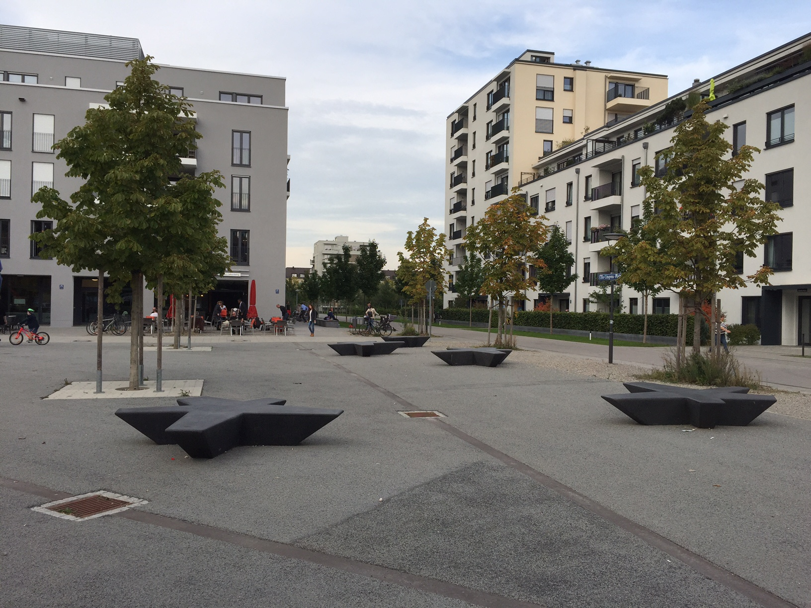 Ella-Lingens-Platz, München (foto van Alexander Steig)